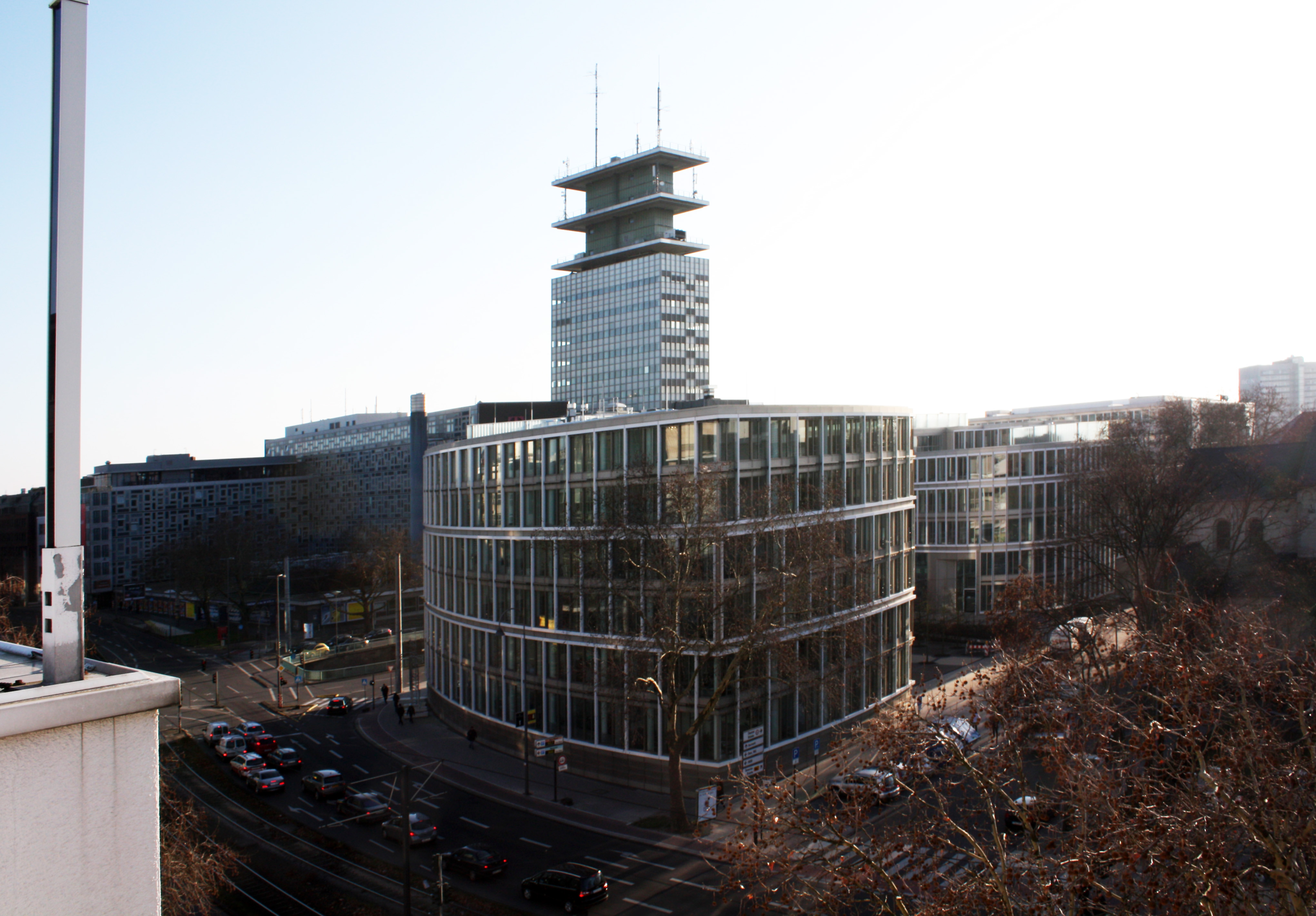 „Cäcilium“ Köln, Cäcilienkloster. Areal der ehemaligen römischen Therme der CCAA